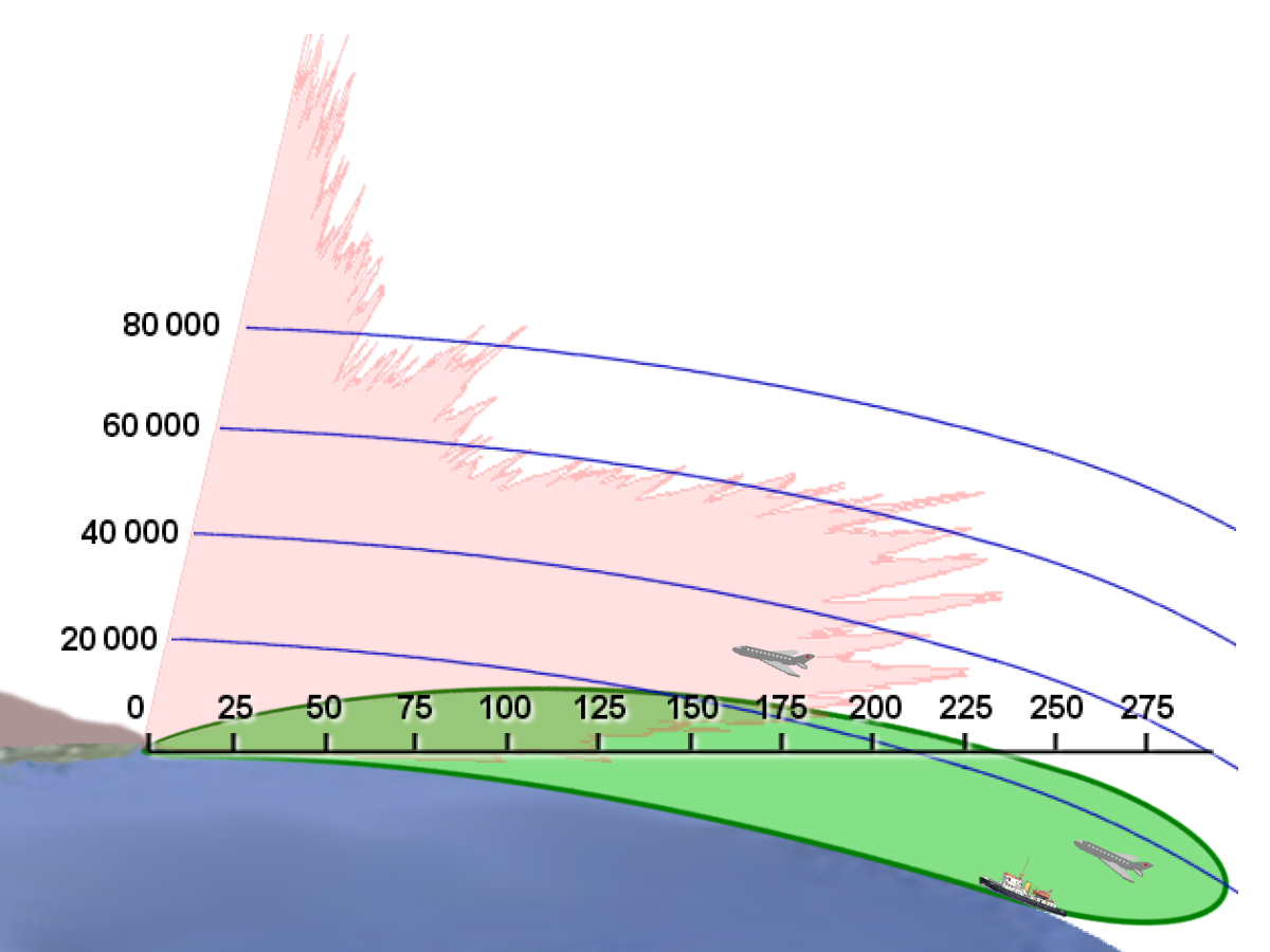 Vergleich von Antennendiagrmmen eines enroute Radars mit einem Over-The-Horizon Surface Wave Radar. Höhenangaben in Fuß, Entfernungen in nautischen Meilen